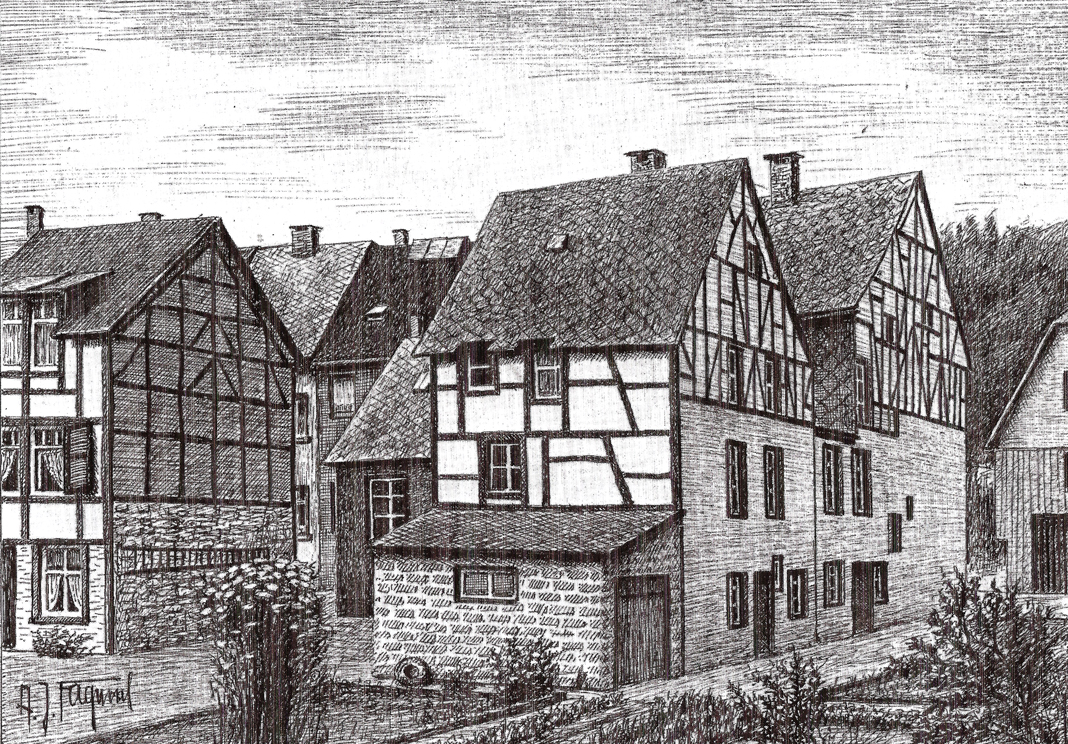 Dessin de maisons en pans-de-bois (rue Cavens à Malmedy) réalisé vers 1970 par Albert Fagnoul (né en 1902 à Waimes). Les habitations à droite sont menacées par un projet immobilier.